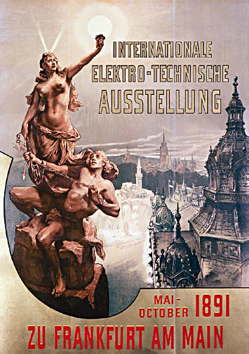 Offizielles Werbeplakat der Internationalen Elektrotechnischen Ausstellung 1891 in Frankfurt am Main.